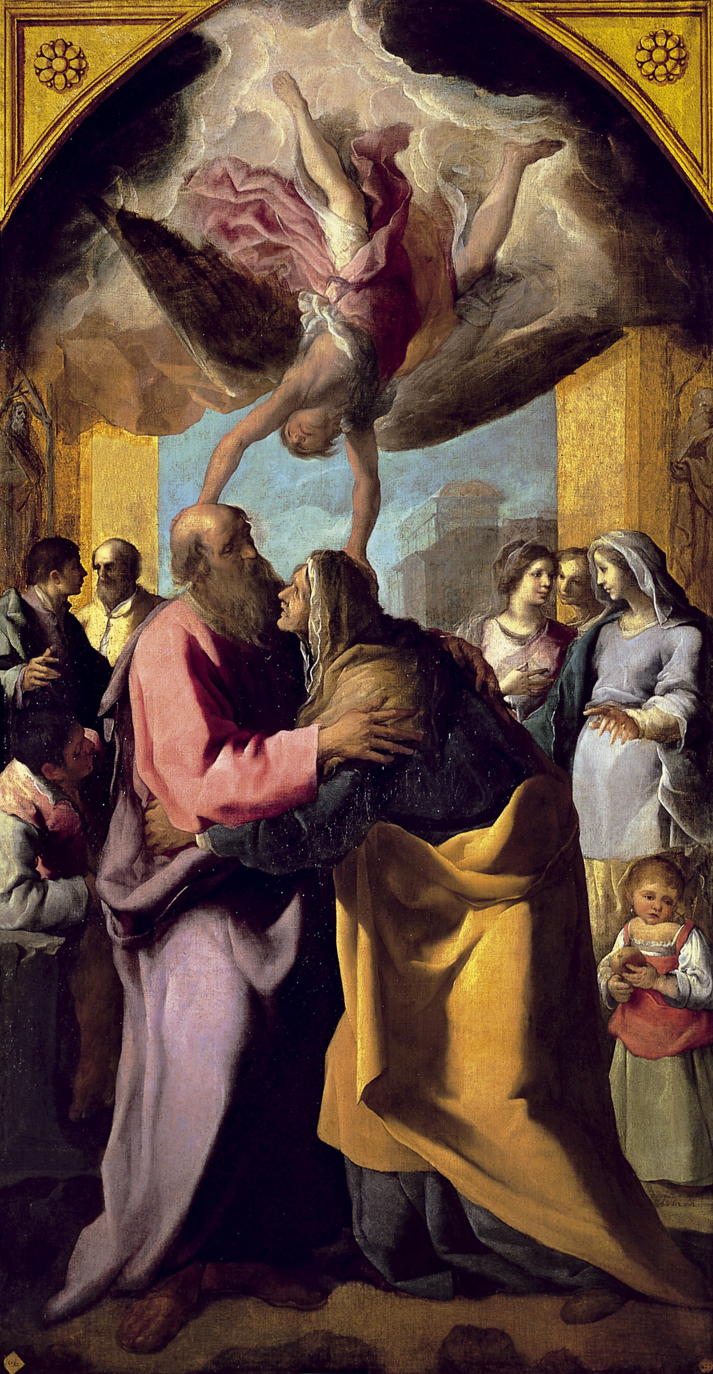 La obra representa a San Joaquín y a Santa Ana, los padres de la Virgen María, abrazándose ante la Puerta Dorada.